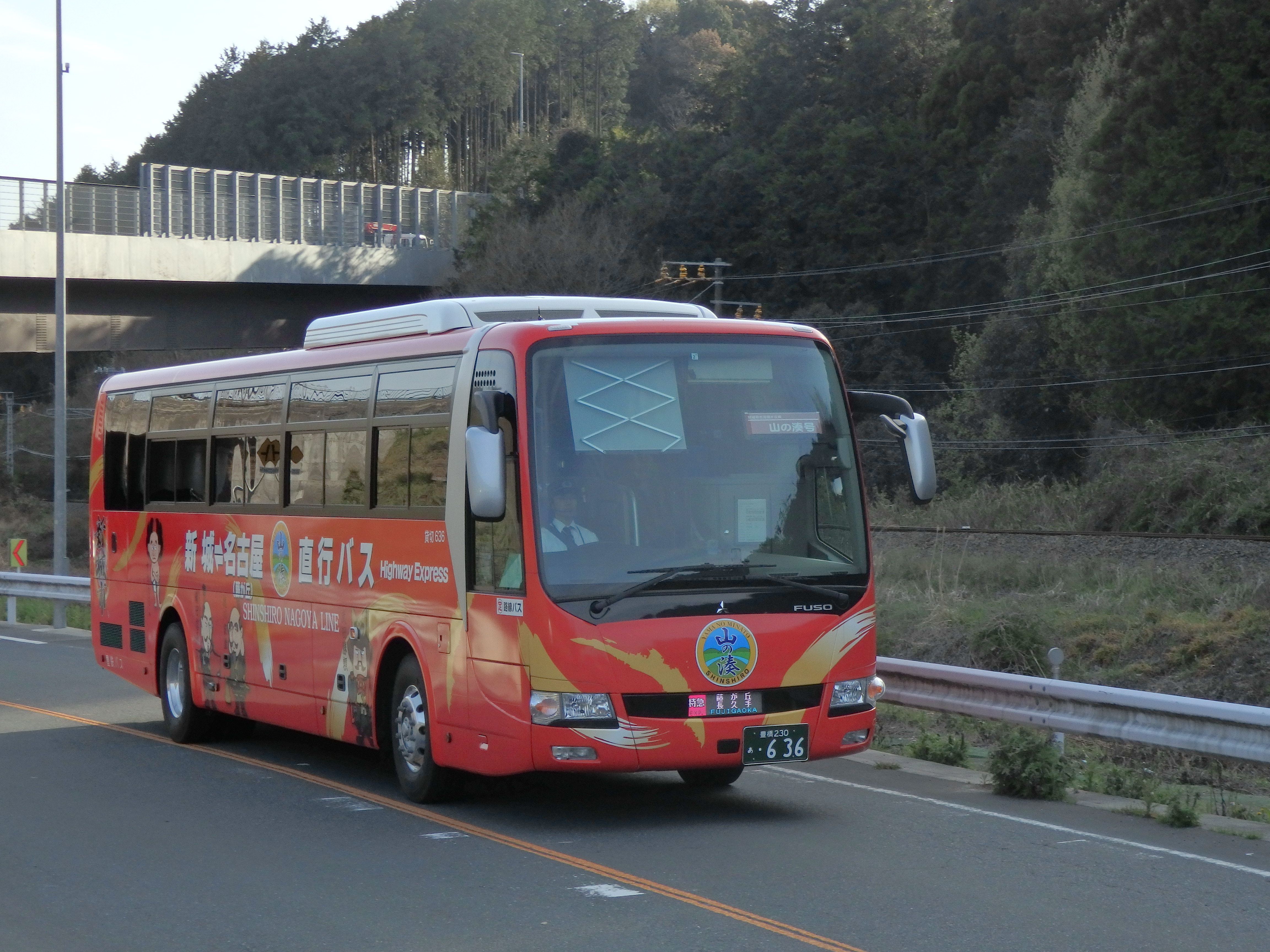 豊鉄バス新城営業所所属貸切636号車エアロエースQTG-MS系